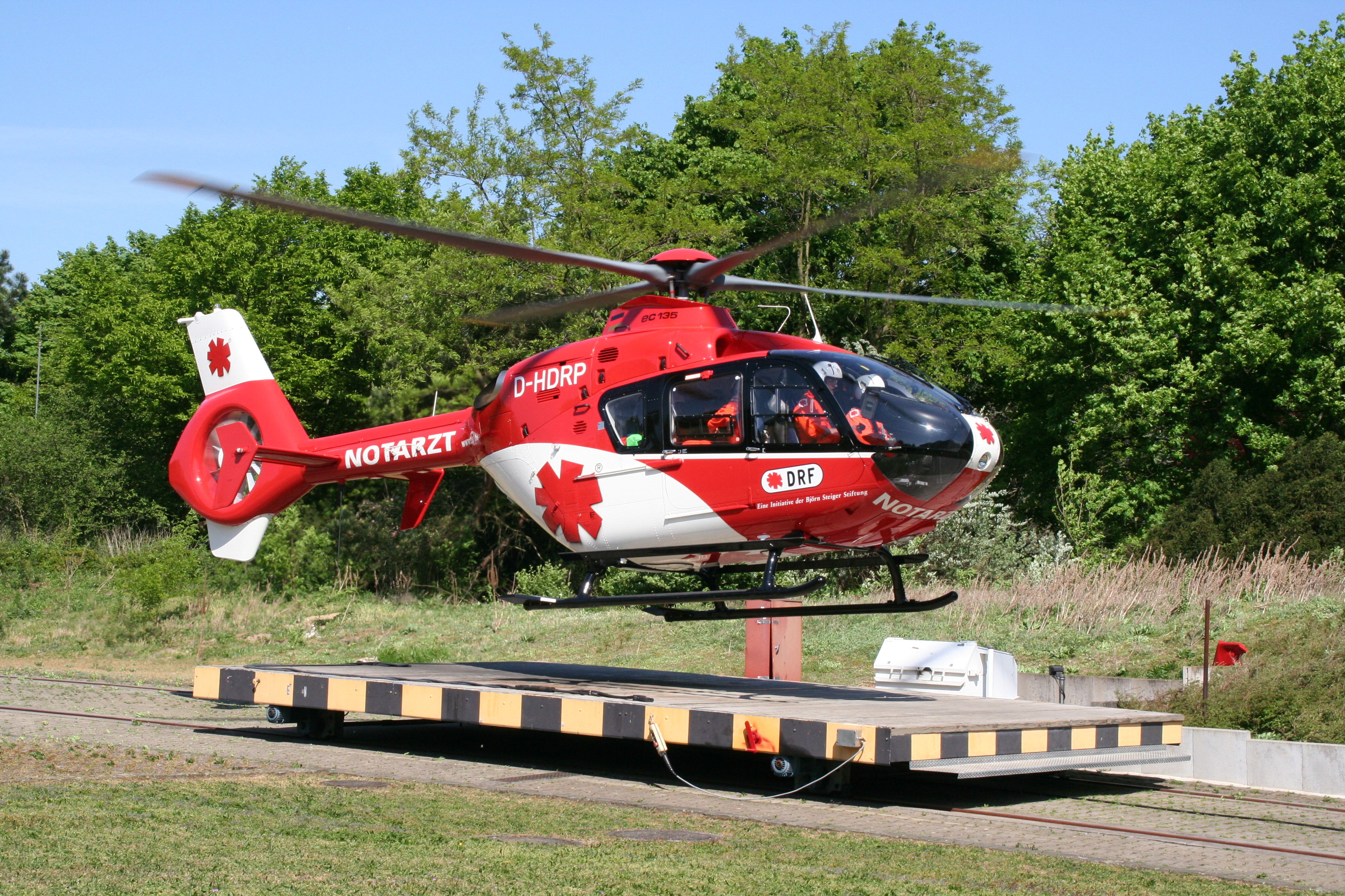 DRF-Hubschrauber des Typs EC 135 im Flug